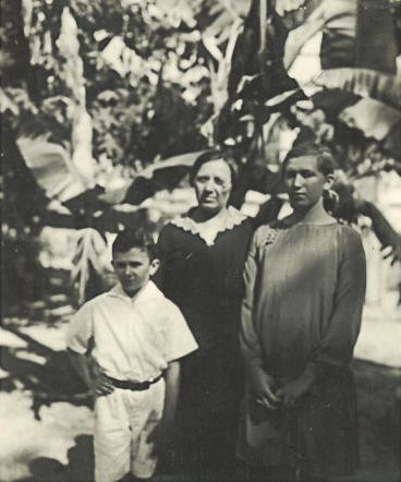 ליובה בורוכוב עם שני ילדיה, שושנה ודוד. דוד נולד בשנת 1917[1], והתמונה צולמה בישראל לפני 1930 (ליובה עלתה לארץ ישראל ב-1925, לפי בורוכוב). סרקתי את התמונה בעצמי.